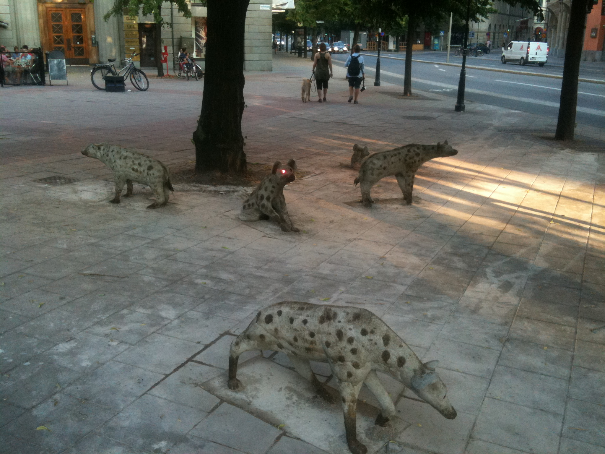 Hyenorna vid Stureplan. Gatukonst utplacerad vid Engelbrektsplan, Stockholm av olabo